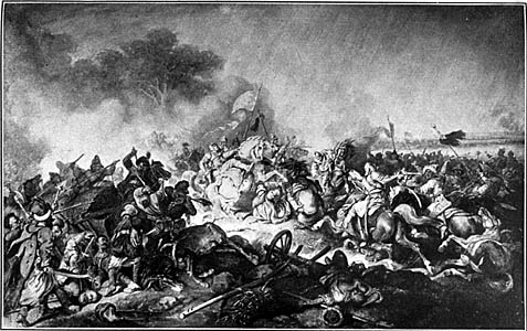 Stefan Potocki's Death Near Zhowty Wody. Watercolour on paper, 108 x 73